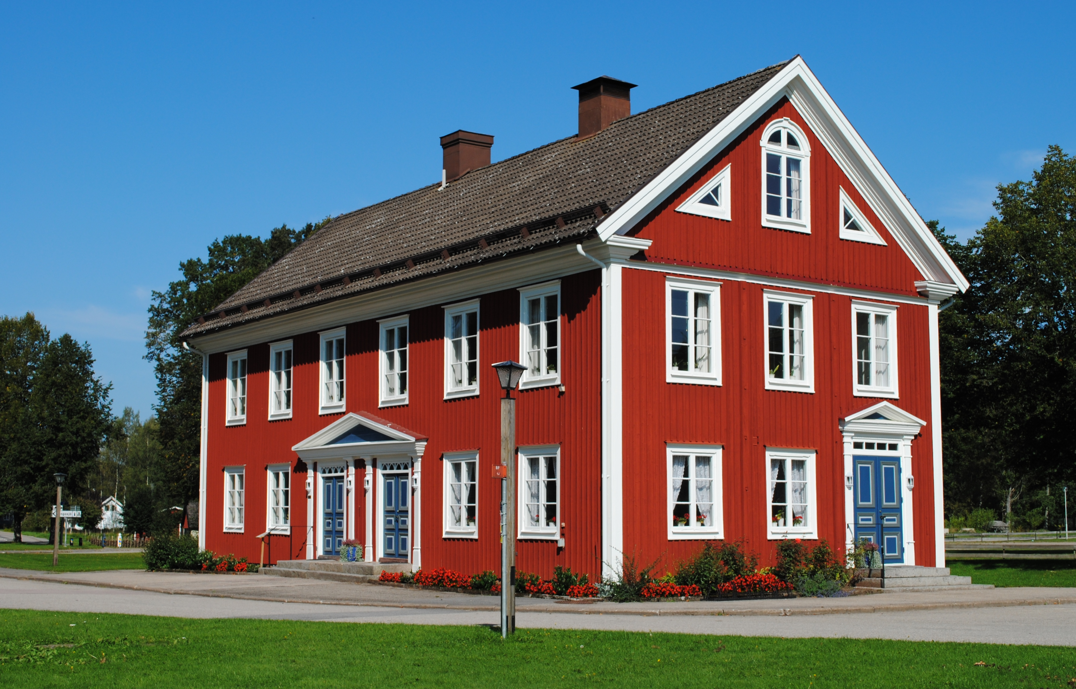 Långasjö sockenstuga